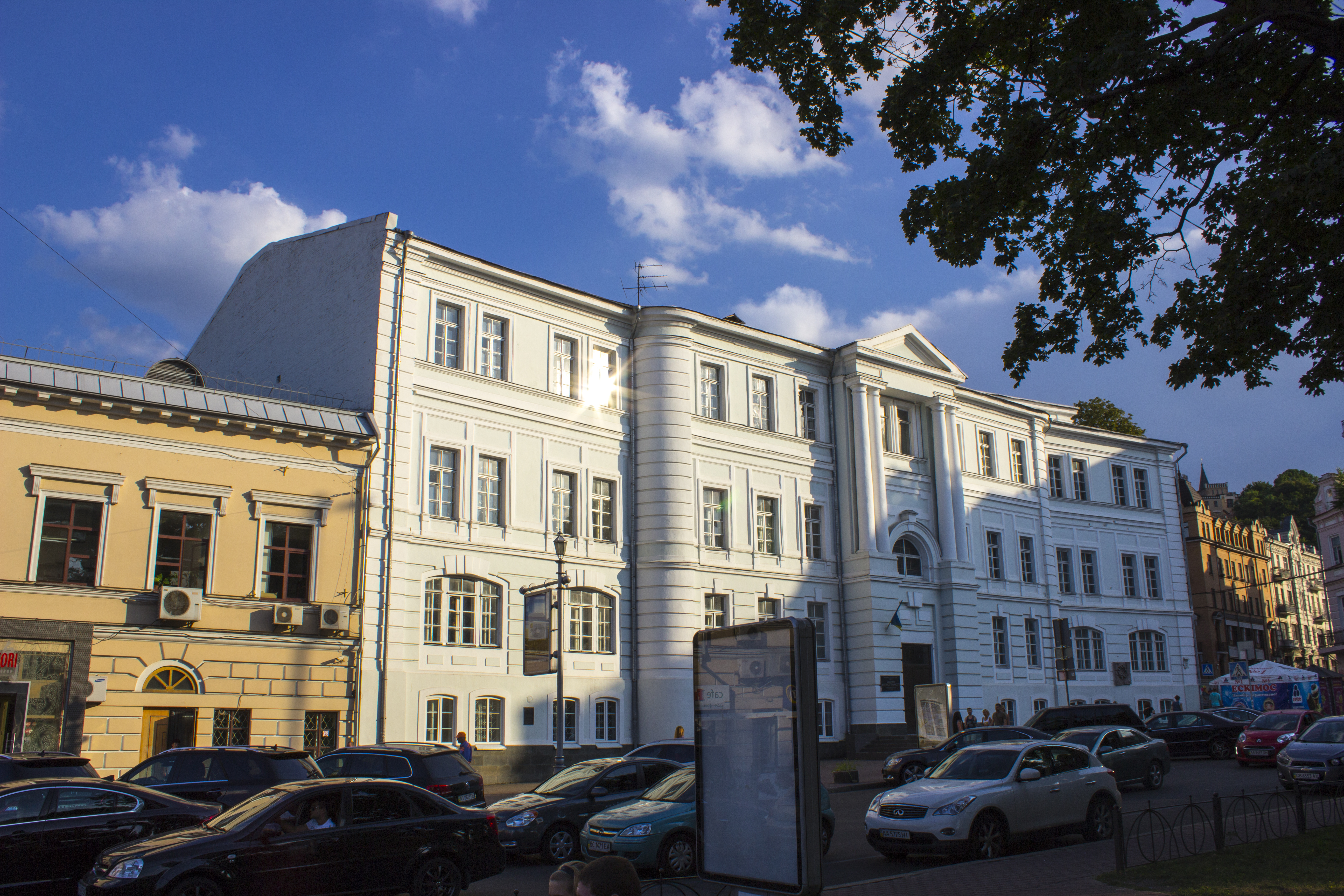 Будинок житловий Назарія Сухоти, де з 1838 р. містилися: магістрат, перша Міська дума; Третя чоловіча гімназія, в якій навчалися Ф. Г. Яновський, лікар, Л. Шестов, філософ, О. Оглоблін, історик; у 1918 р. містився штаб січневого повстання Подільского, Київ, Покровська вул., 8/12